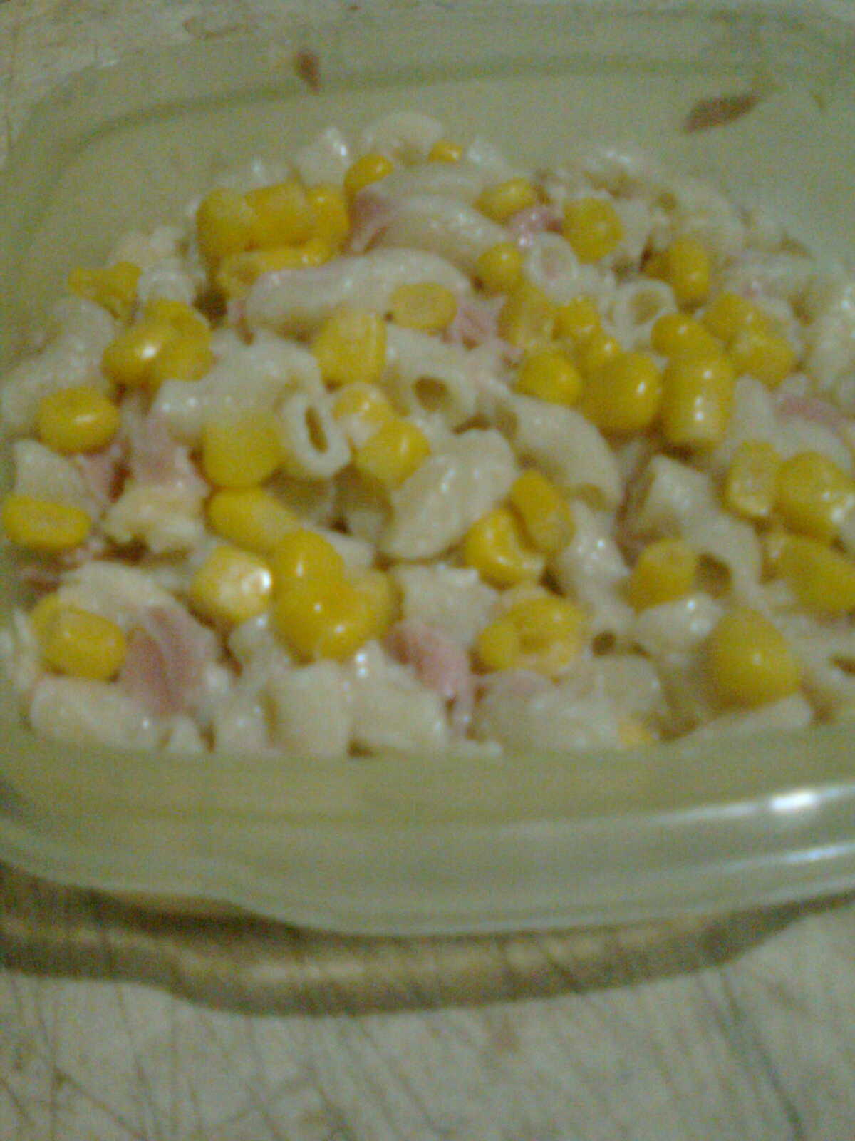 Sopa de coditos.